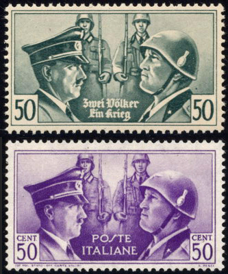 Vergleich: Britische Propagandafälschung für Italien (oben); Echte Marke (Michel Nr. 626, Italien (unten).